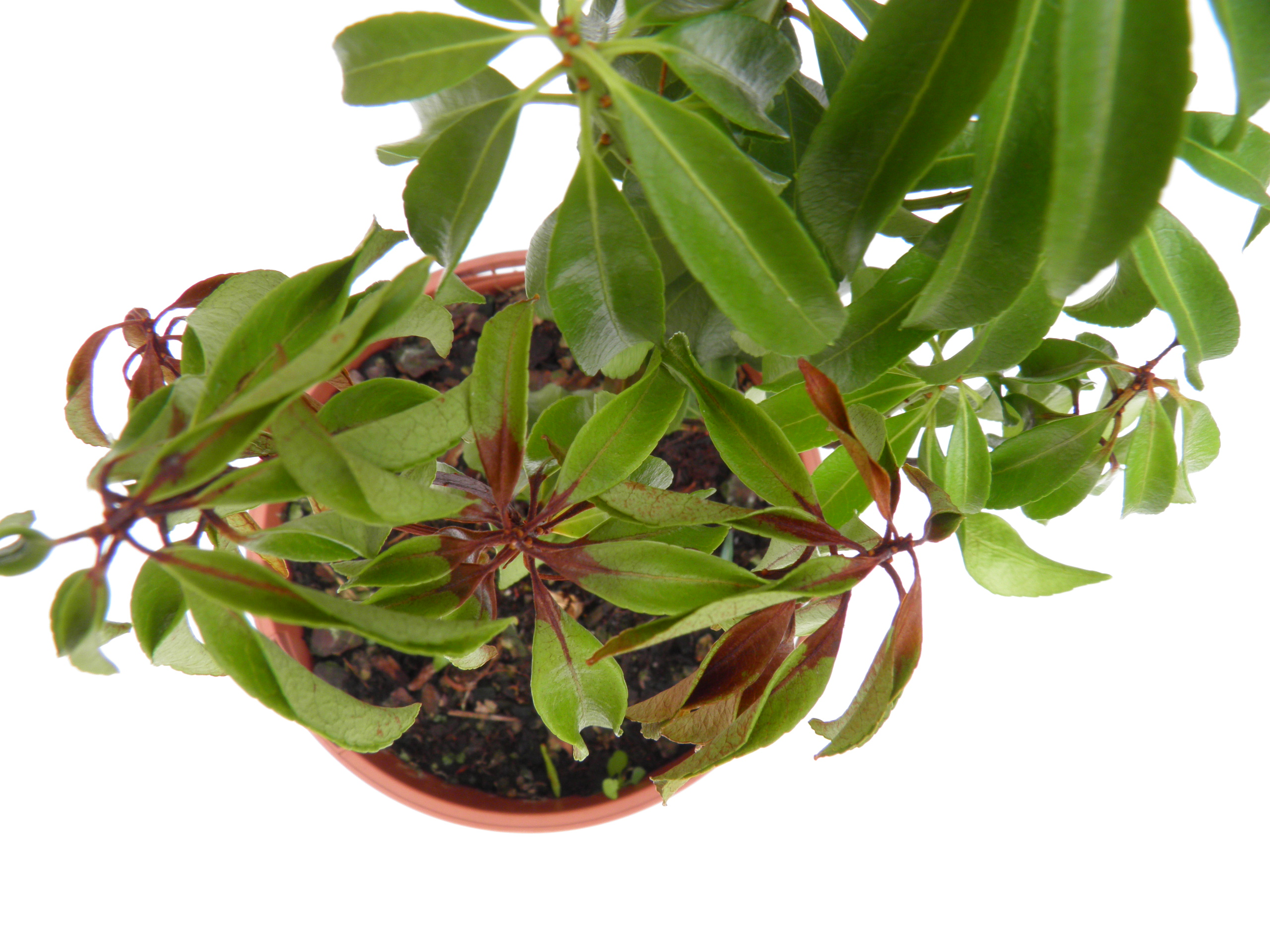 Pieris japonica Phytophthora ramorum Karel Cerny, Marcela Mrazkova Pruhonice, Czech Republic, 2011